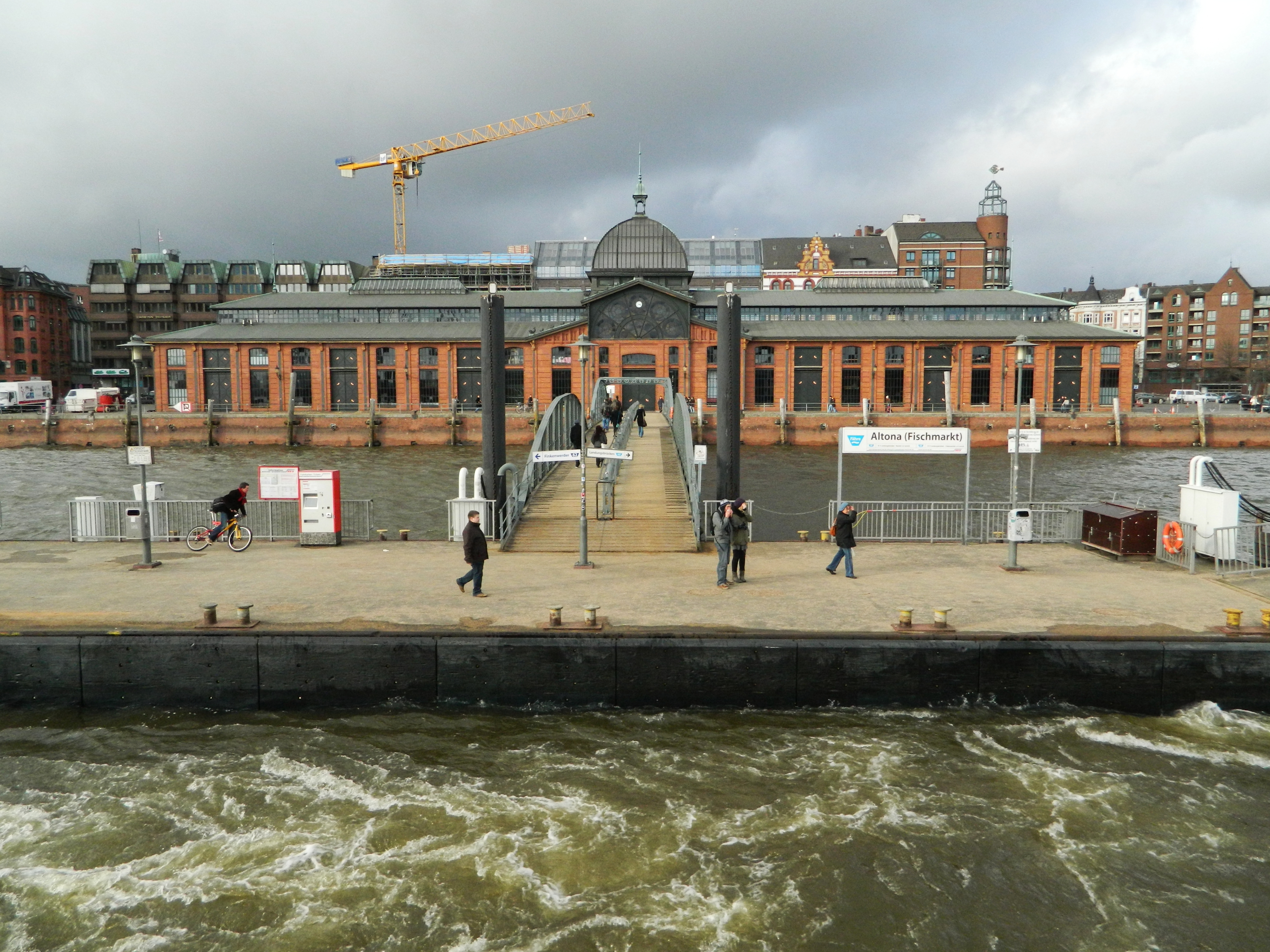 Fischmarkthalle